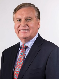 Gastón Von Mühlenbrock Zamora en la fotografía oficial de diputados periodo 2018-2022. (Fotos: Christel Andler, René Lescornez, Johanna Zárate)